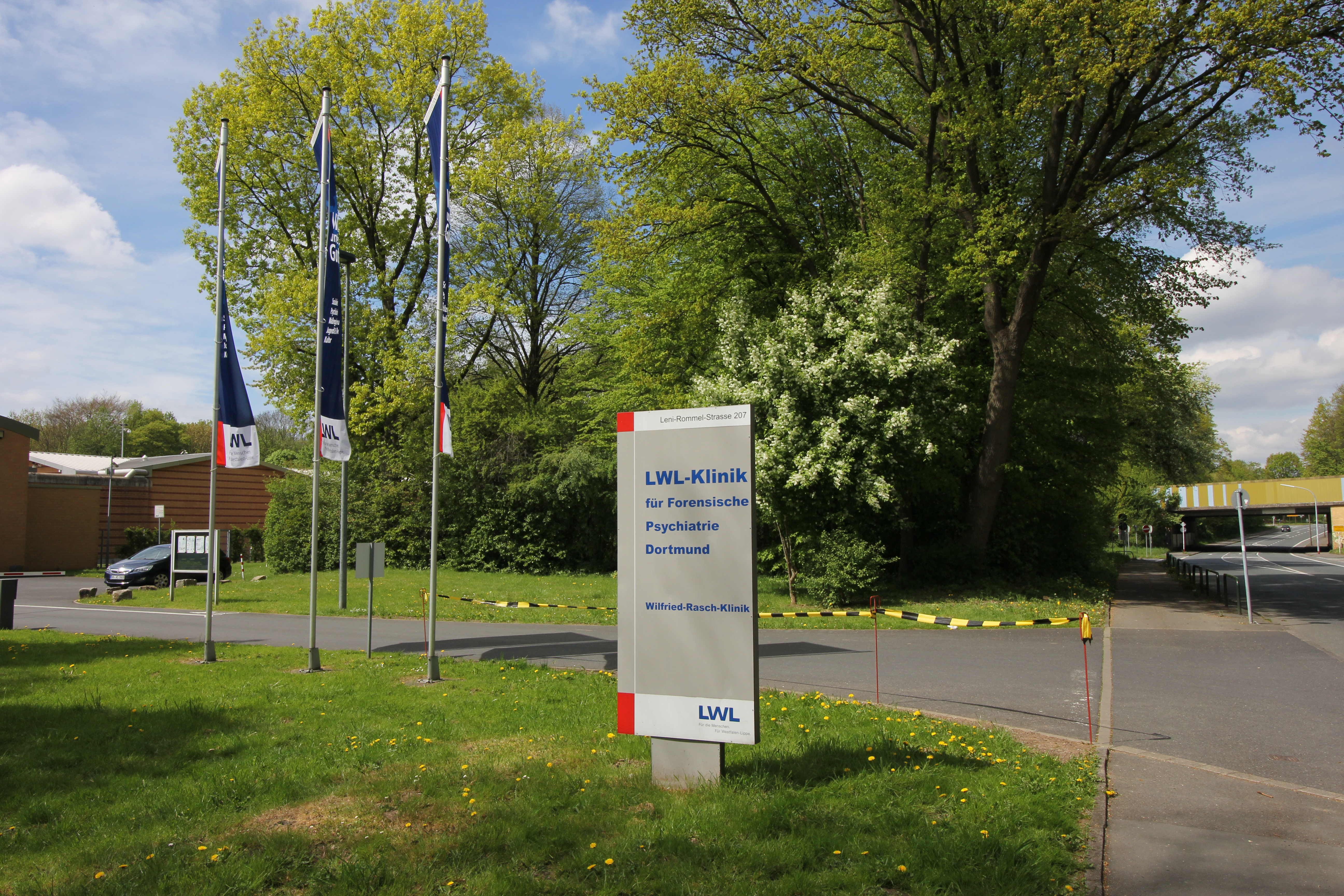 Die Wilfried-Rasch-Klinik in Dortmund ist eine Klinik für Forensische Psychiatrie